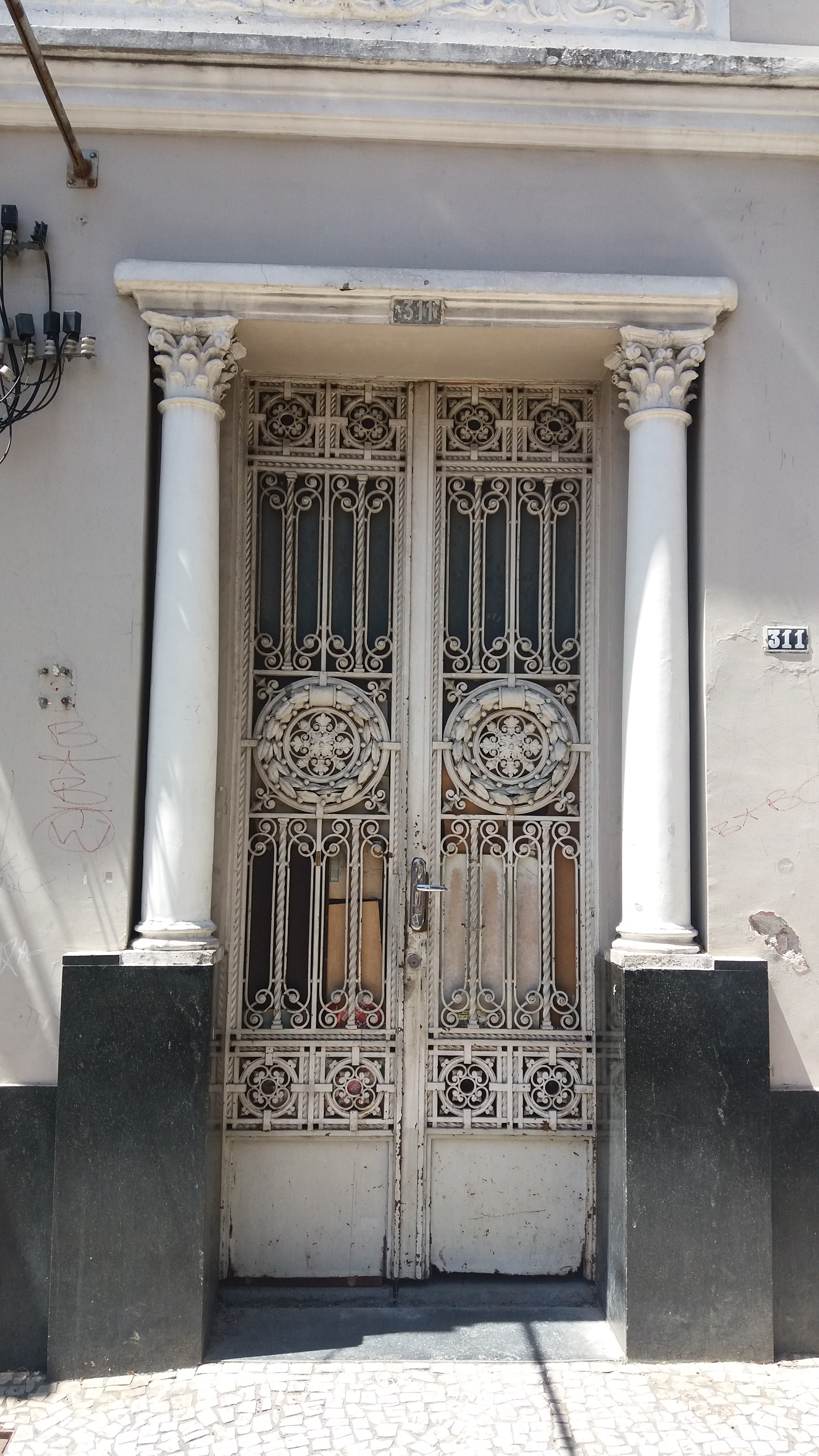 Portão do Teatro Brasileiro de Comédia, que hoje se encontra fechado, tem remendos de madeira na estrutura de vidro